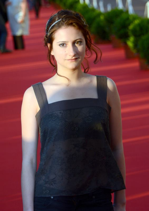 Lola Créton au festival du film de Cabourg